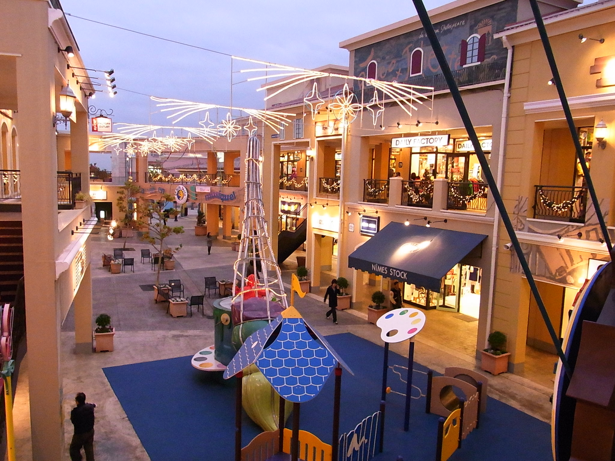 三井アウトレットパーク多摩南大沢